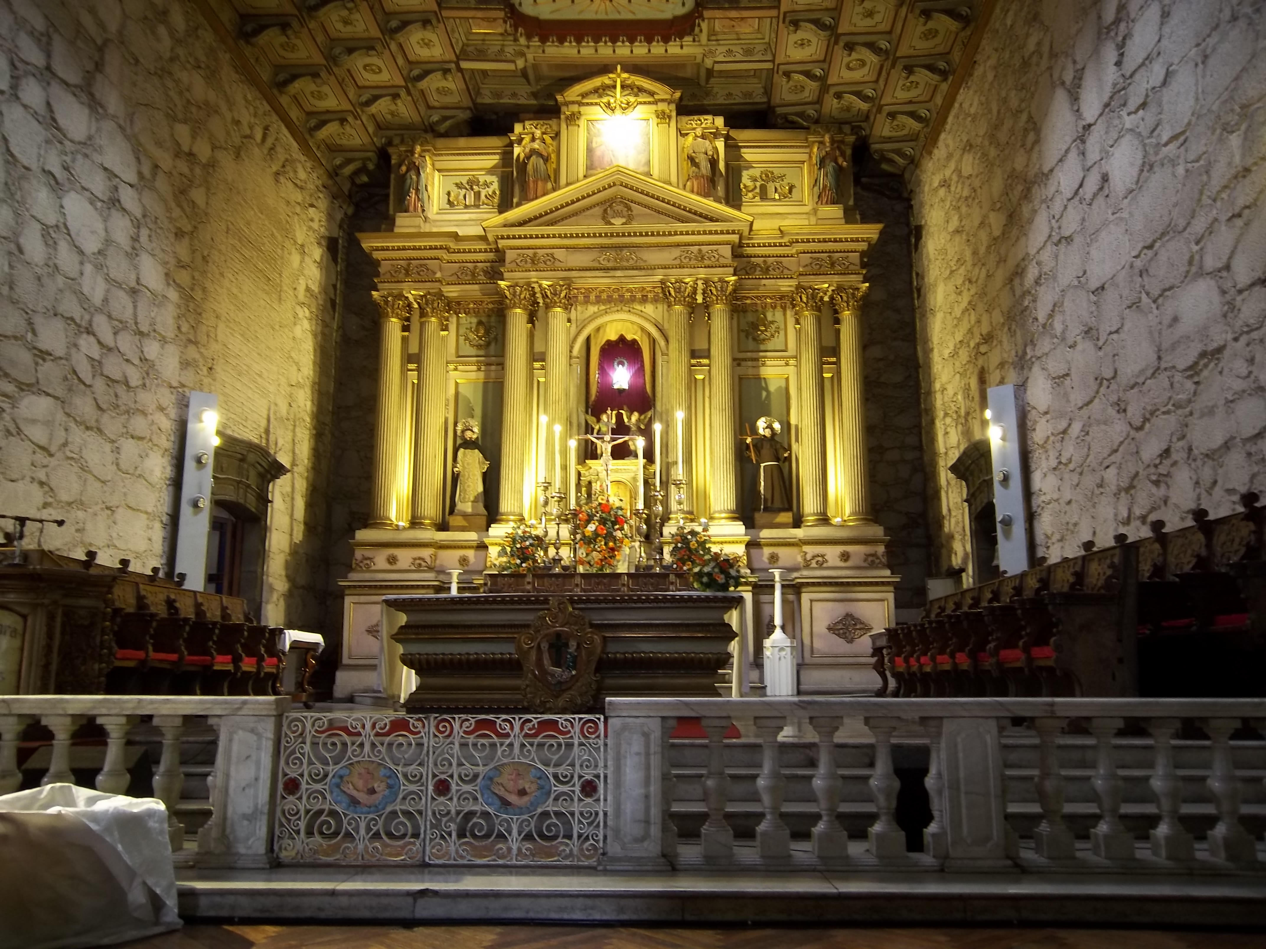 Altar mayor de la Iglesia de San Francisco en Santiago de Chile, Región Metropolitana, Chile.